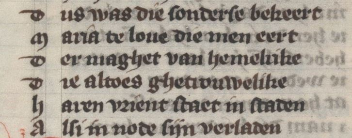 Section of folium 053r from the Beatrijs Dus was die sonderse bekeert Maria te love, die men eert, Der maghet van hemelrike, Die altoes ghetrouwelike Haren vrient staet ein staden, Alsi in node sijn verladen.